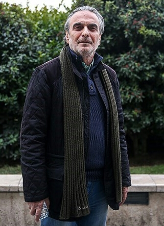 همایون ارشادی - بهمن ۱۳۹۴